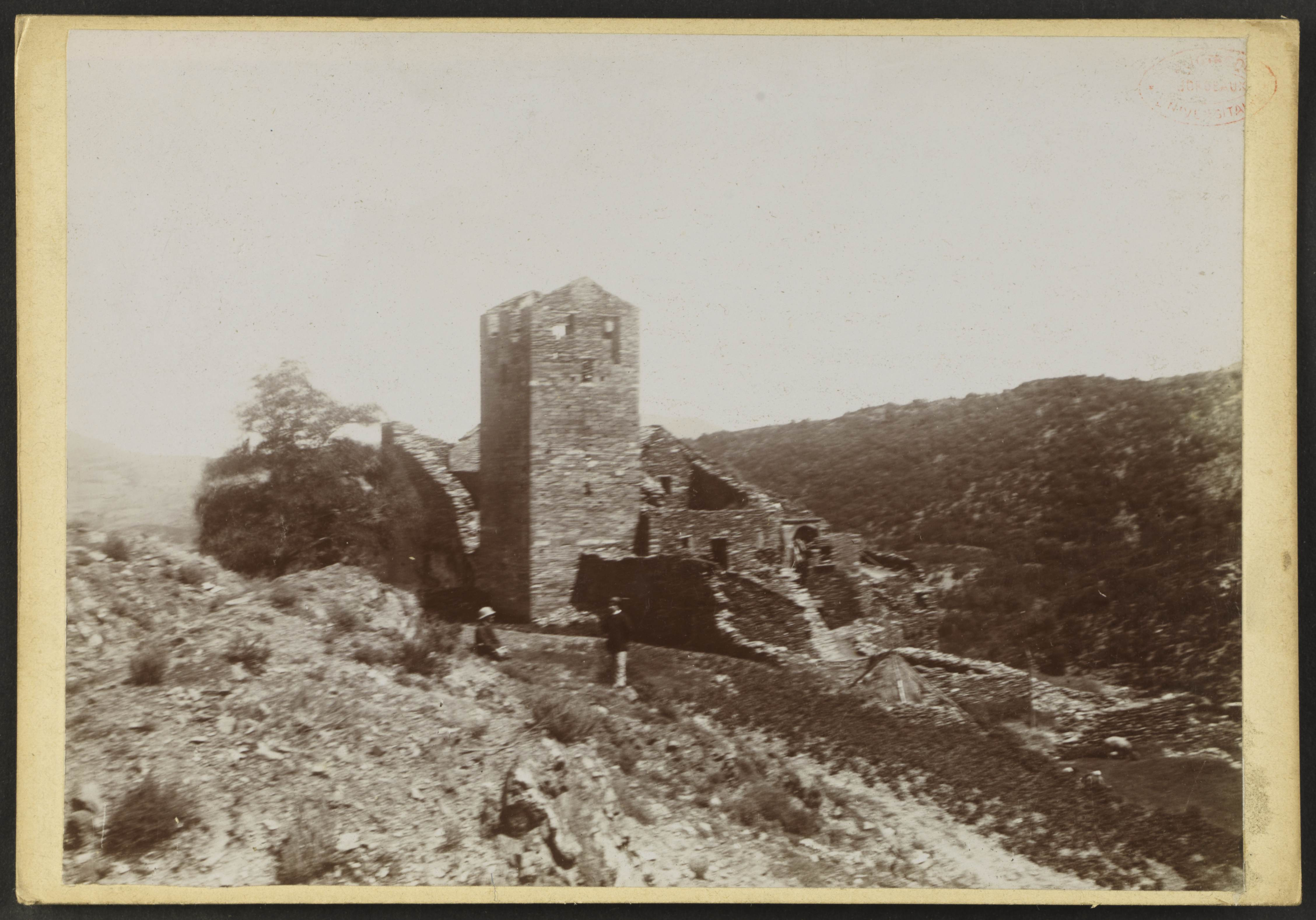 Prieuré de Serrabona; Vue générale, ruines